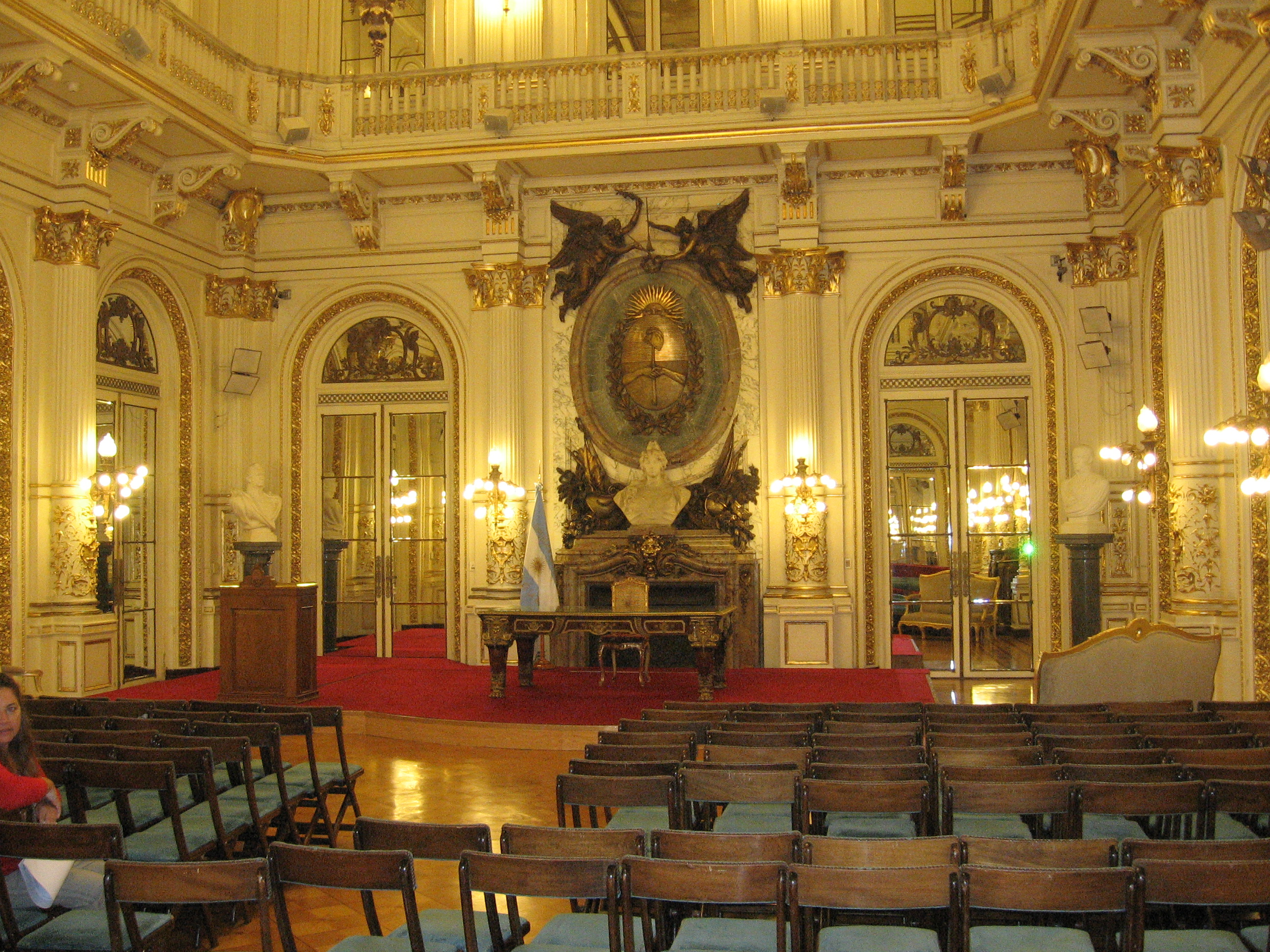 Salón Blanco de la Casa Rosada